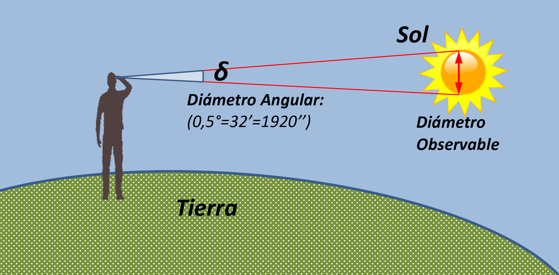 Diámetro angular del Sol percibido desde la Tierra